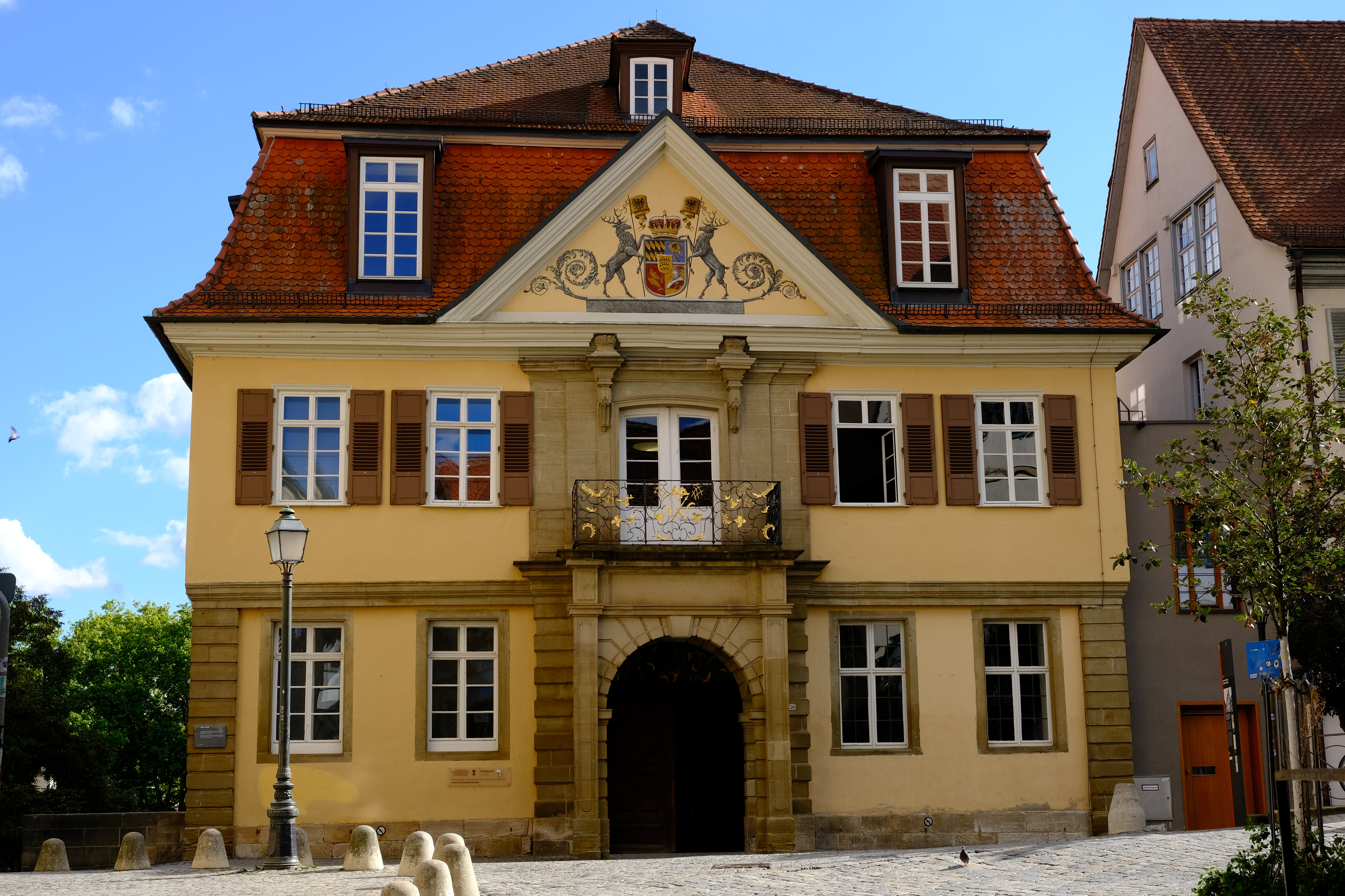 Alte Aula in Tübingen im September 2018